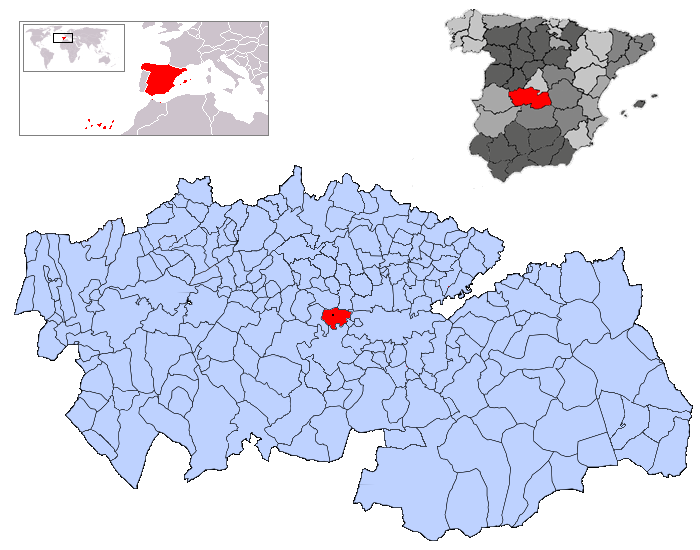 Albarreal de Tajo en la provincia de Toledo